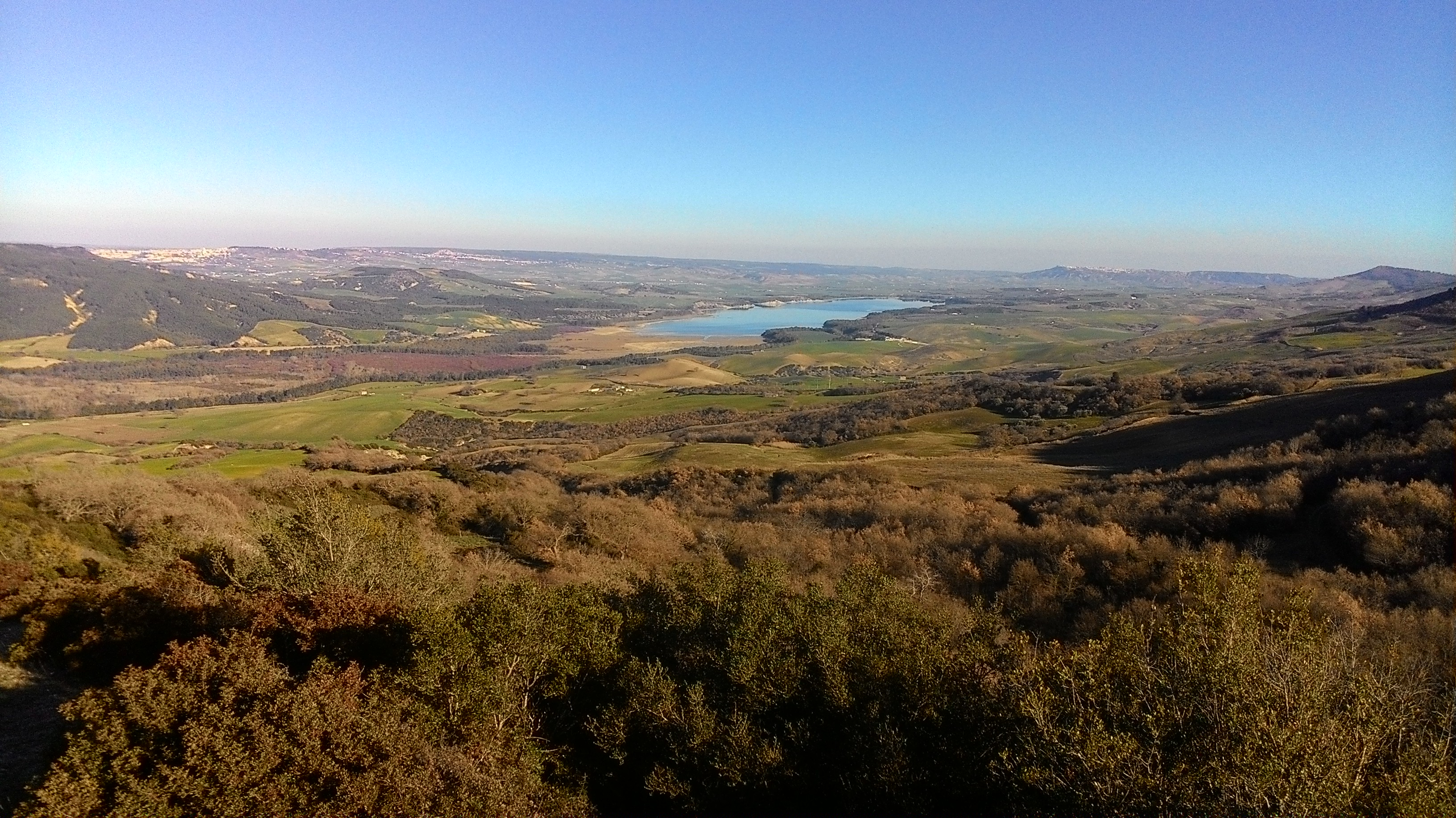 Il Bosco Coste di Grottole fa parte della Riserva Naturale di San Giuliano ed è caratterizzato dai percorsi naturalistici, dall'area pic-nic attrezzata e dal parco eolico.